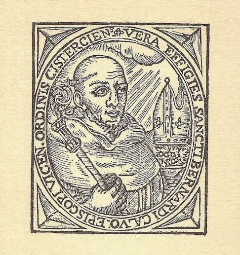 Xilografia amb la imatge de sant Bernat Calbó